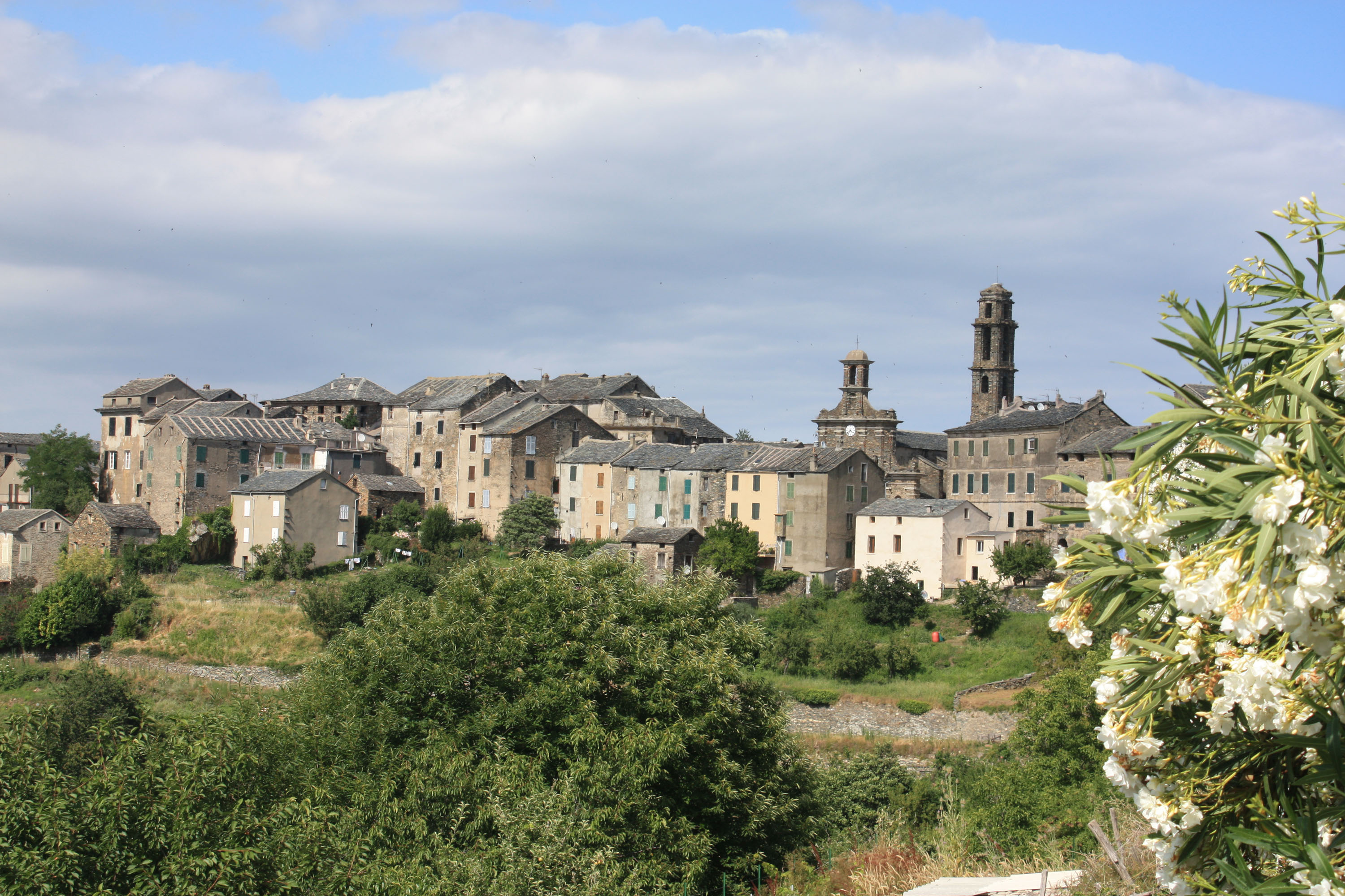 Vue générale du village de Penta di Casinca